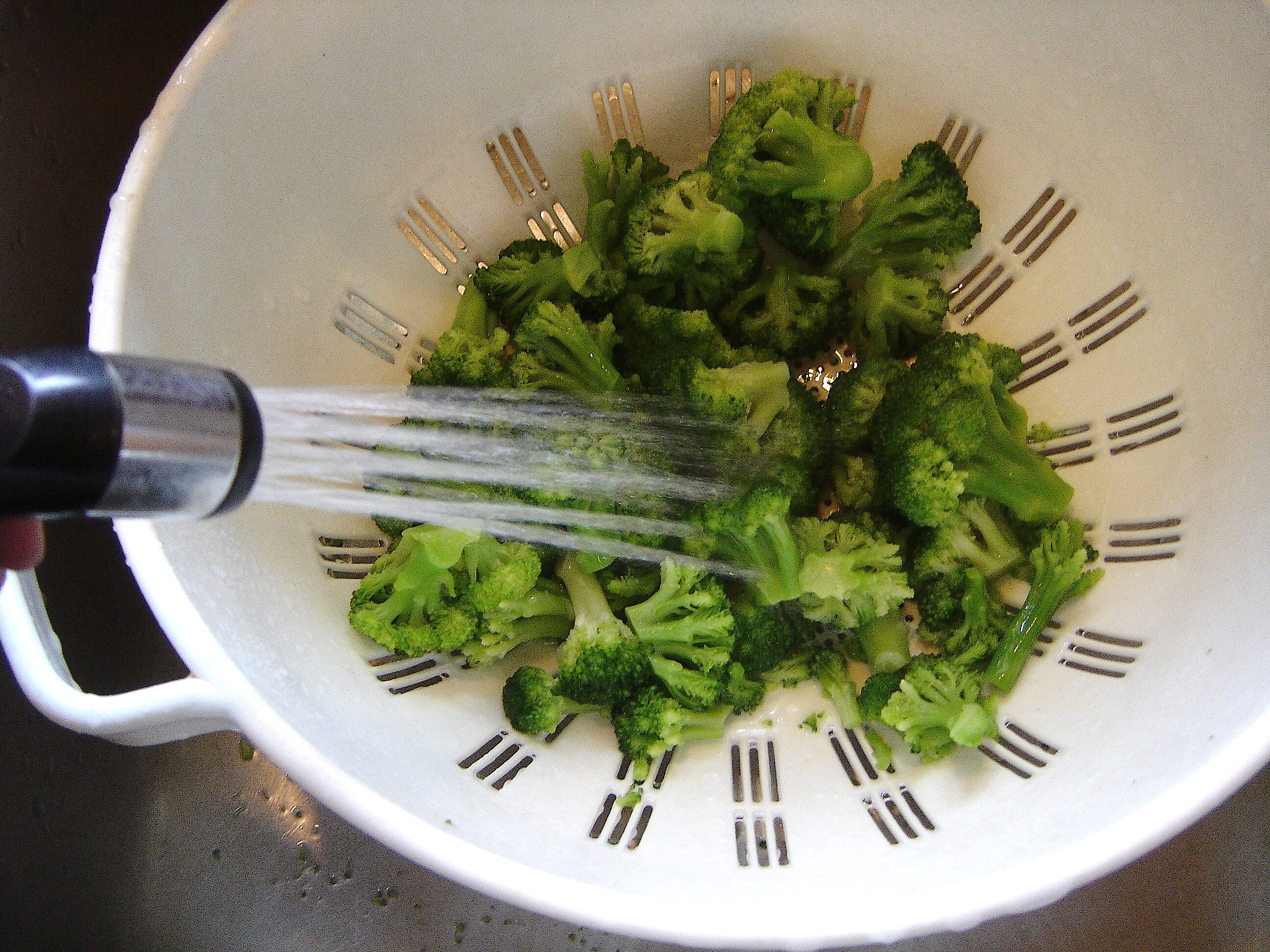 Fehlerhaftes Abschrecken von blanchierten Broccoli-Röschen in einem Durchschlag unter fließendem kaltem Wasser.